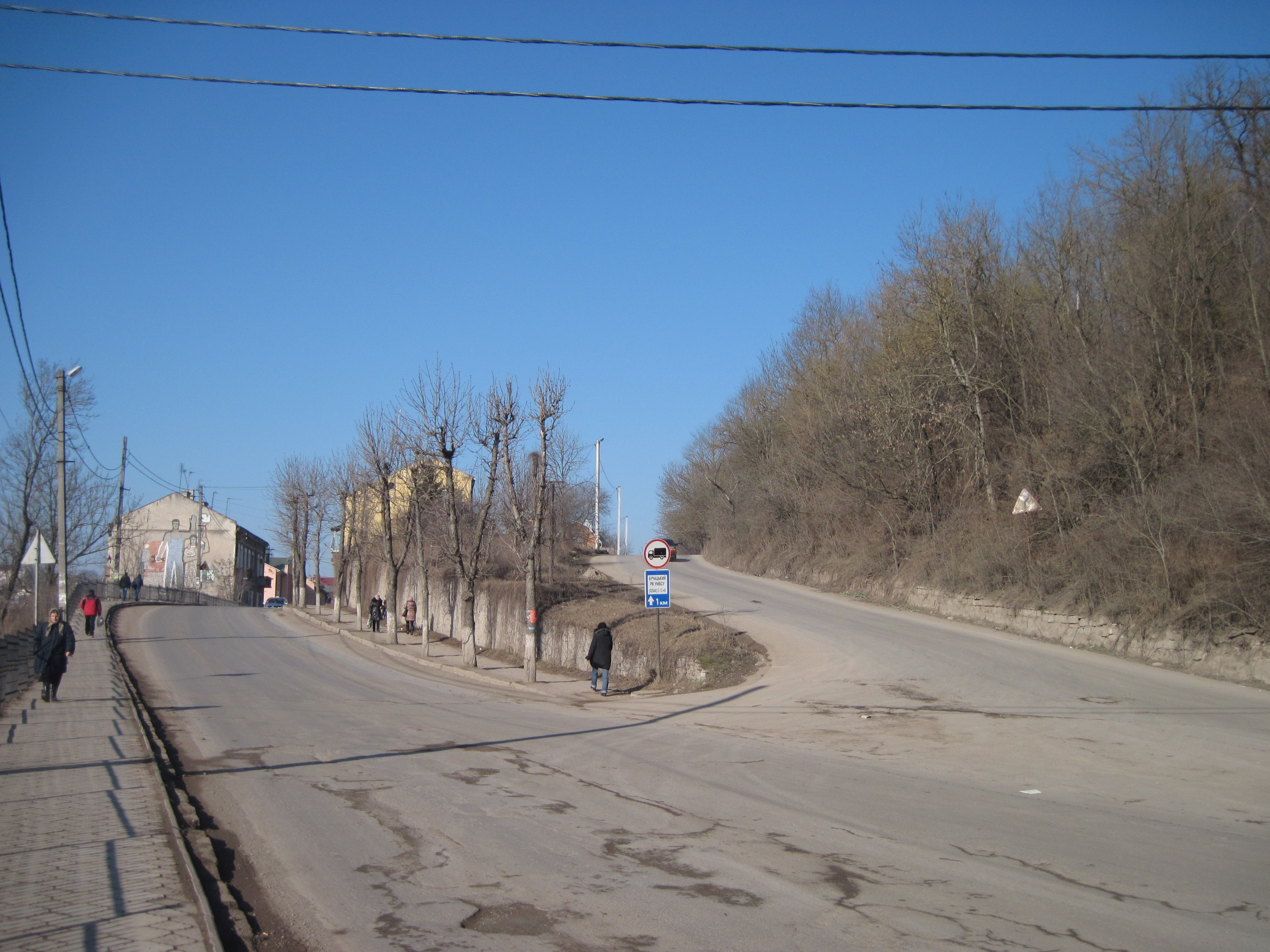 Бучач. Початок старої об'їзної дороги поблизу австостанції та єврейського (діял. жидівського) цвинтаря, в'їзд до центральної частини міста